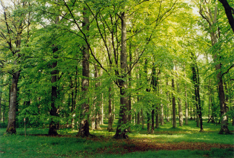 Bučina na Dianě